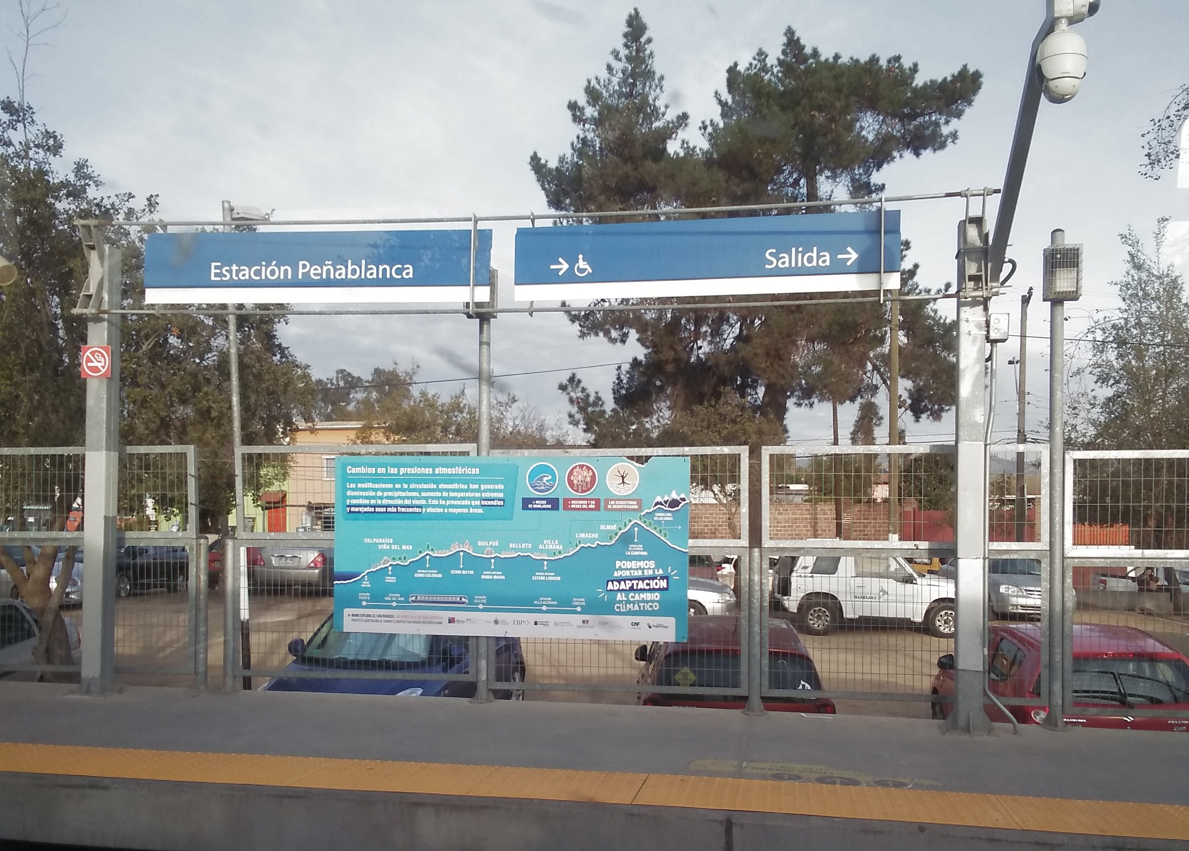 Andén en dirección Limache de la estación Peñablanca del Metro Valparaíso.